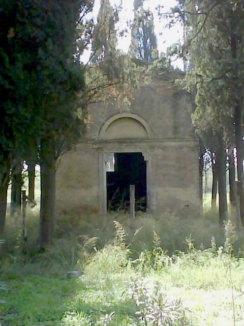 La Cappella di Santa Maria alla Trappola presso Grosseto